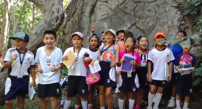 recorrido con alumnos por la selva de la roqueta